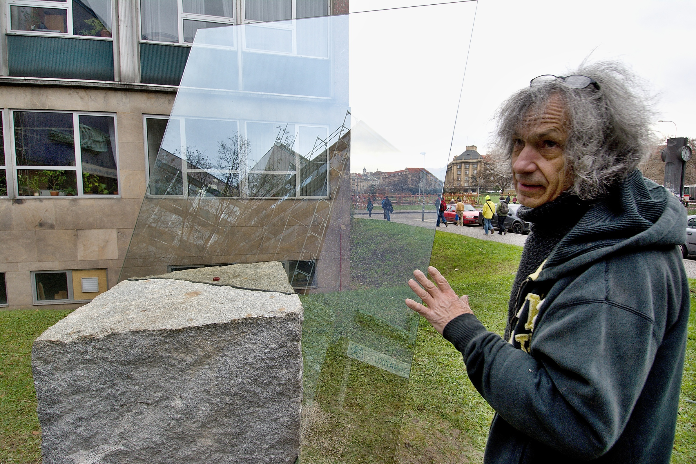 Marian Karel při instalaci své plastiky v areálu ČVUT v Praze.